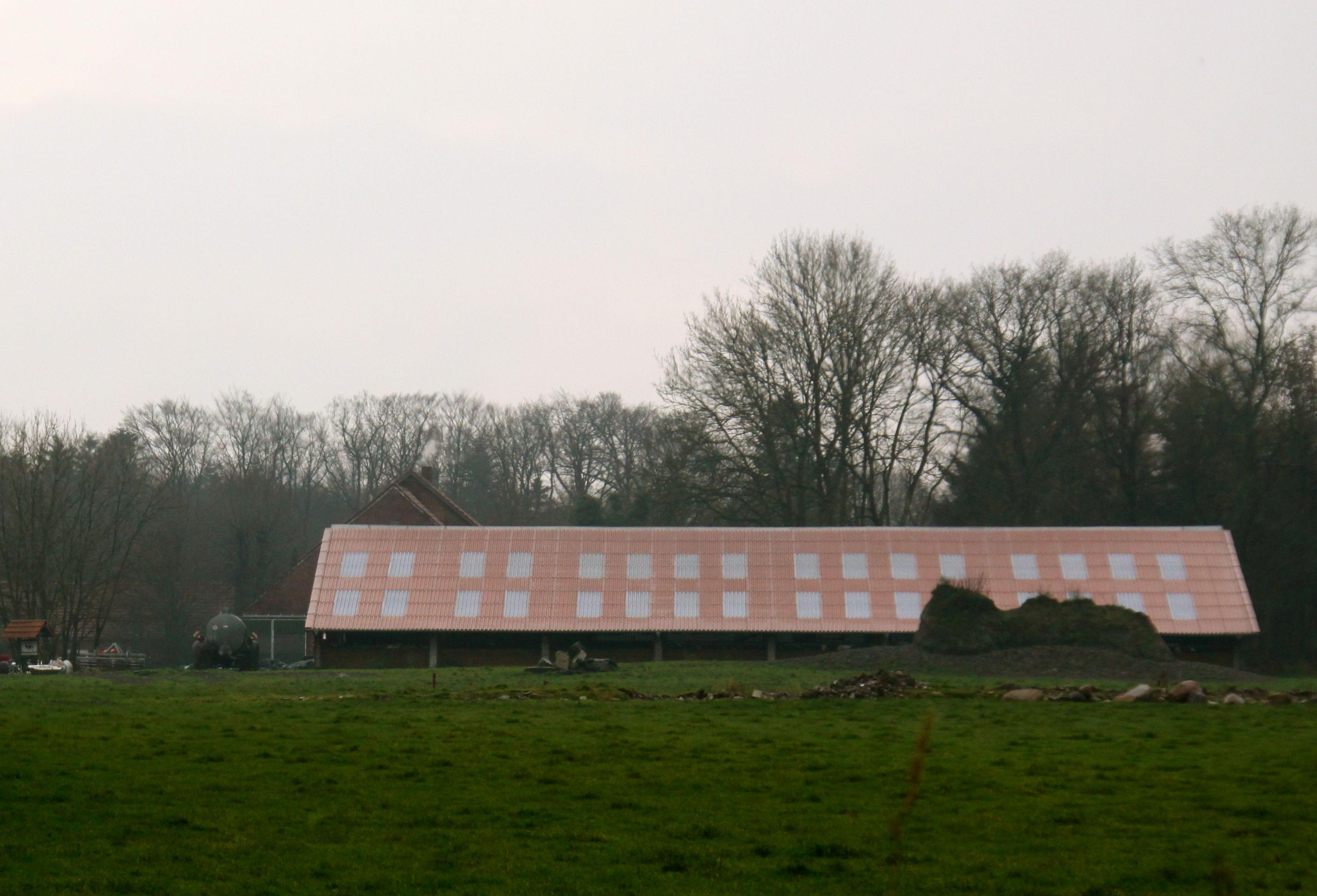 Domaene Kloster Schoo